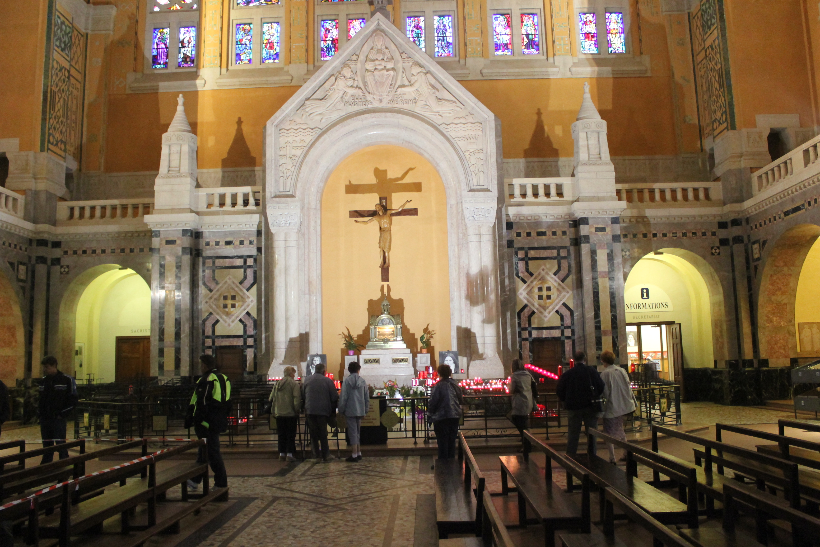 Basilique Sainte-Thérèse de Lisieux (14)